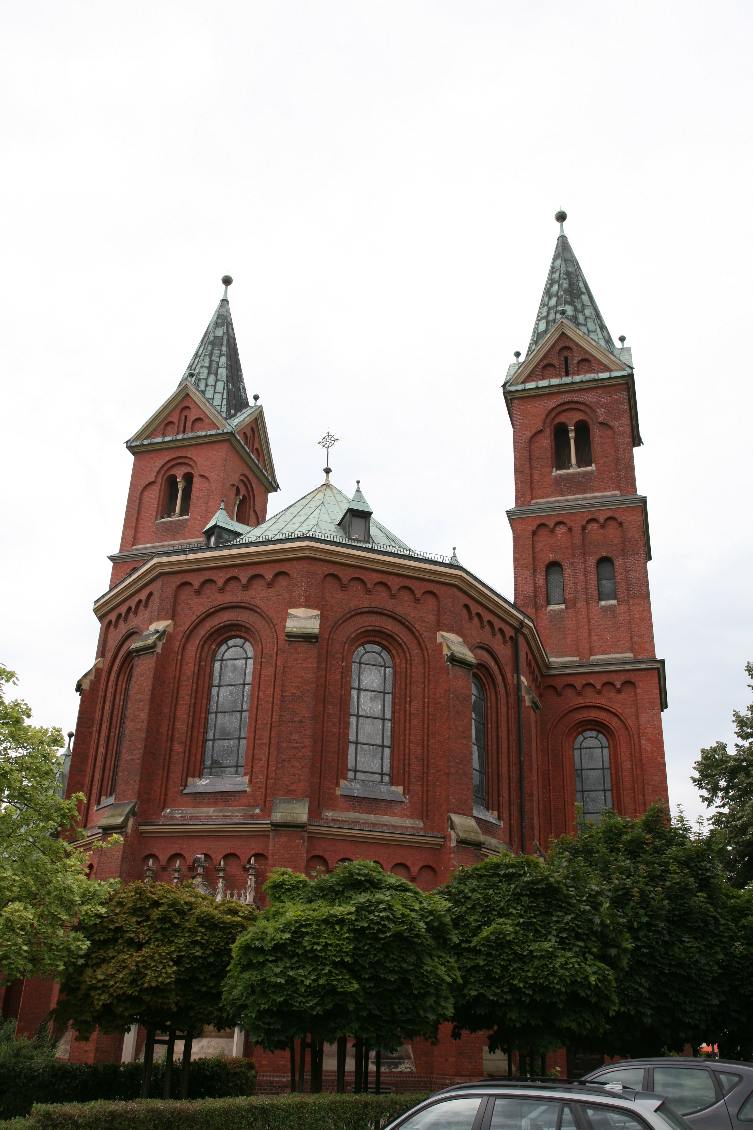 St. Gertrud Kirche is a church in Lohne (Oldenburg)